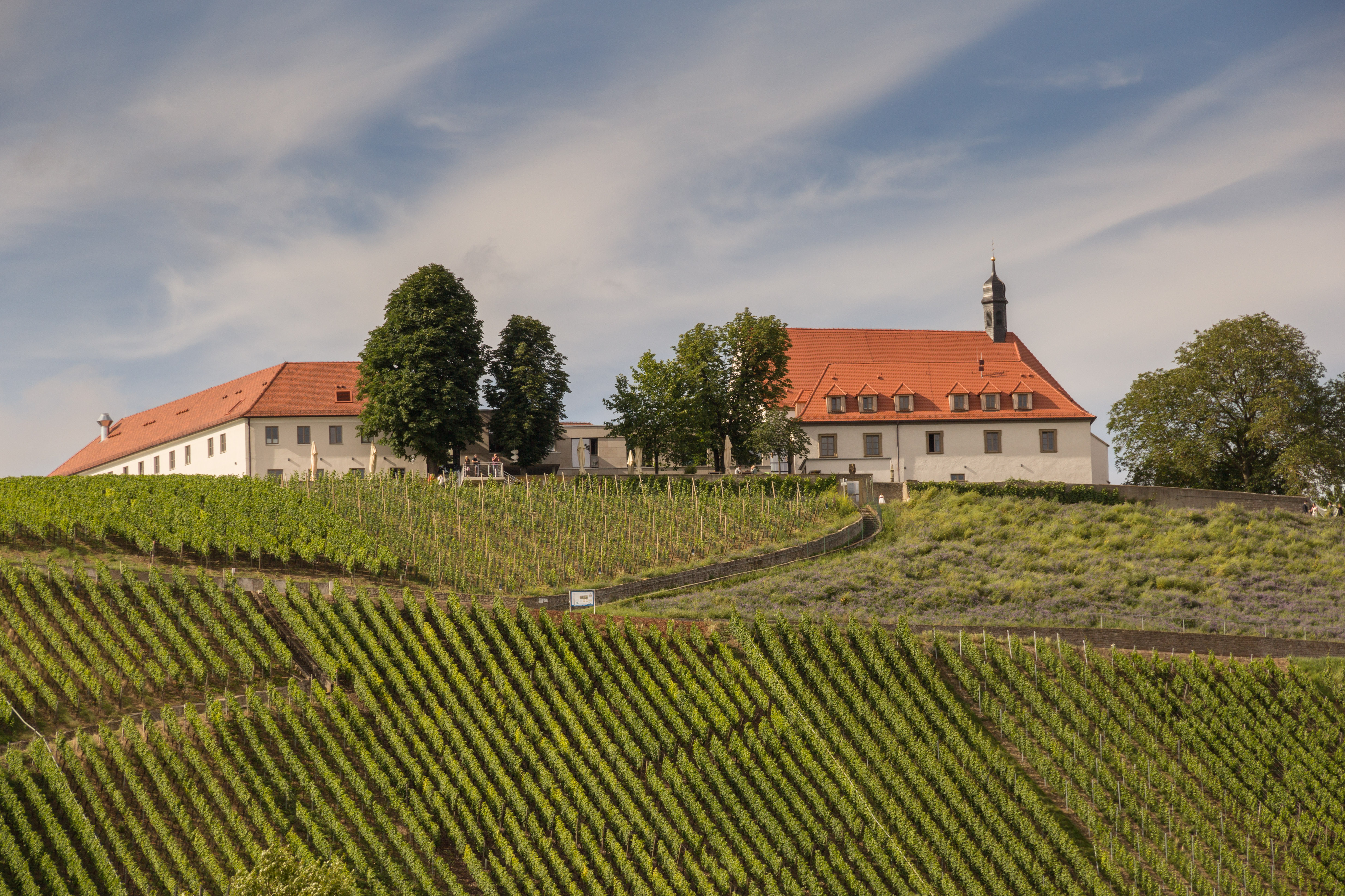 Vogelsburg, Ehemaliges Karmelitenkloster, seit 1957 Gemeinschaft der Augustinus-Schwestern,This is a photograph of an architectural monument.